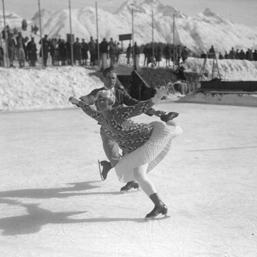 Die große Winter-Olympiade in St. Moritz! Neueste Aufnahmen von unserem nach St. Moritz entsandten Sonder-Bild-Berichterstatter. Das Wiener Eiskunstlaufpaar Scholz-Kayser bei der Vorführung ihres fabelhaften Könnens.